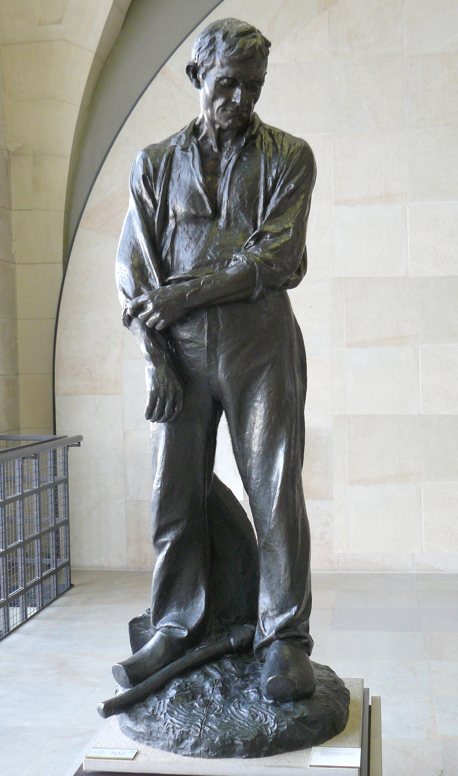 Statue de paysan, Jules Dalou, bronze posthume d'après un plâtre pour le Monument aux ouvriers non réalisé - Hauteur 1,97 m - Musée d'Orsay (Paris) n° RF 2999